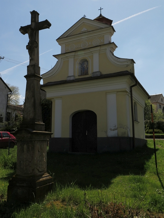 Kaple Panny Marie Bolestné, náves, u čp. 6, Pateřín.